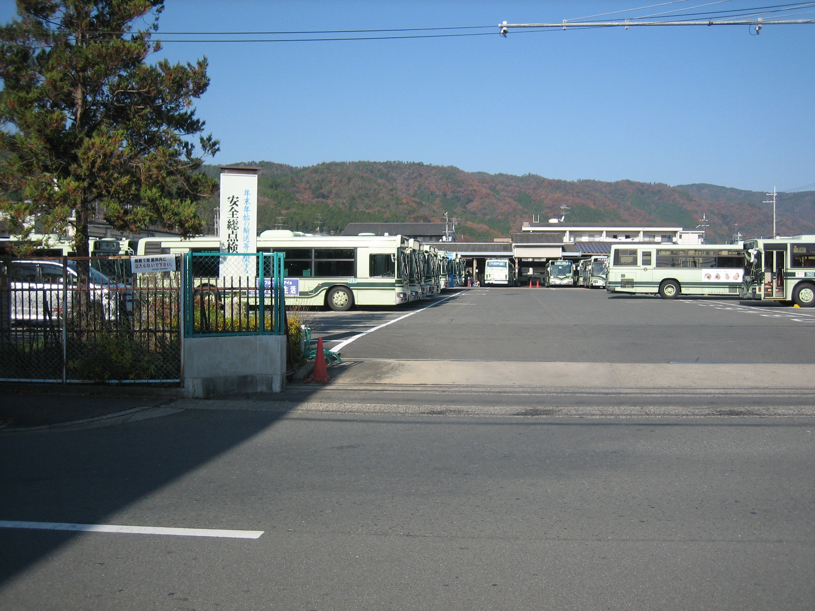 京都市営バス西賀茂営業所を南側正門前から撮影